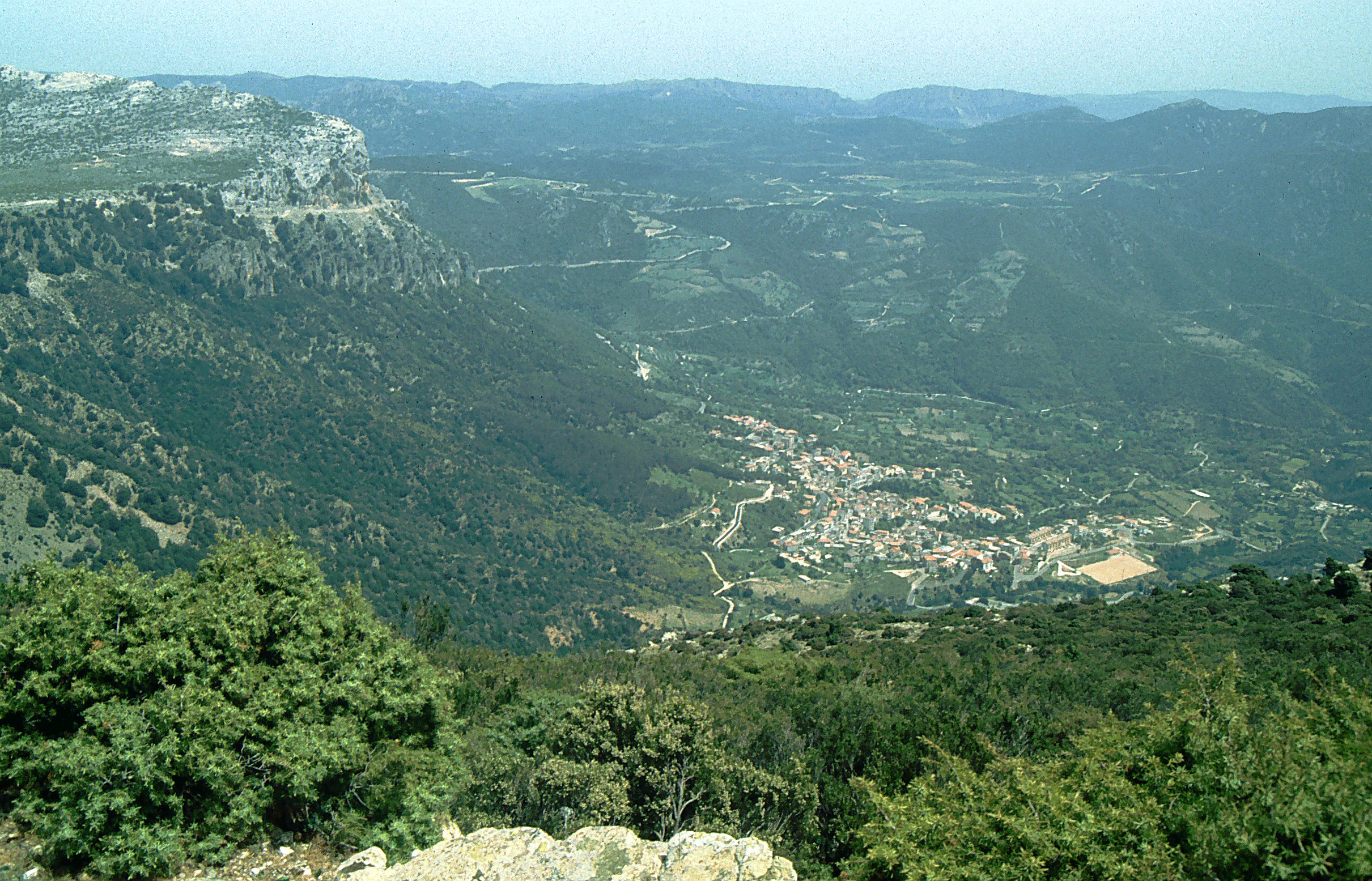 Blick in das Tal von Urzulei